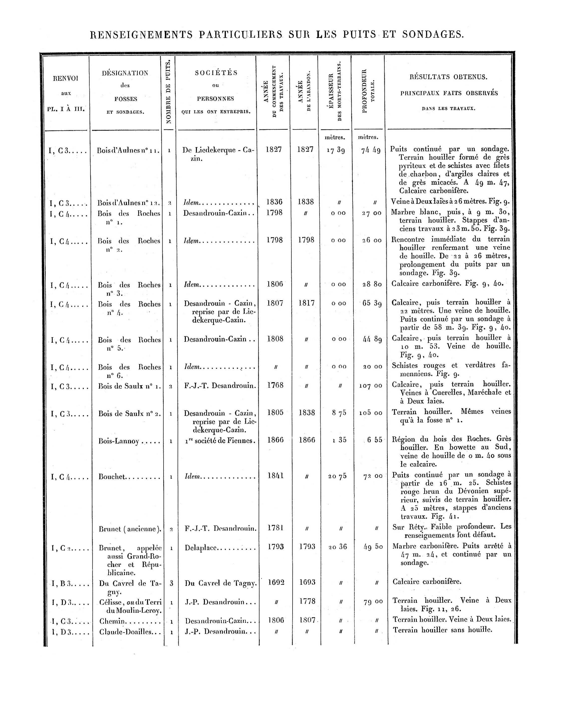 Liste des puits de mine et des sondages. Mines du Boulonnais. Document extrait de Étude des Gîtes Minéraux de la France. Topographie Souterraine du Bassin Houiller du Boulonnais ou Bassin d'Hardinghen, par A. Olry, ingénieur en chef des Mines. Chapitre IX, pages 172 à 189.